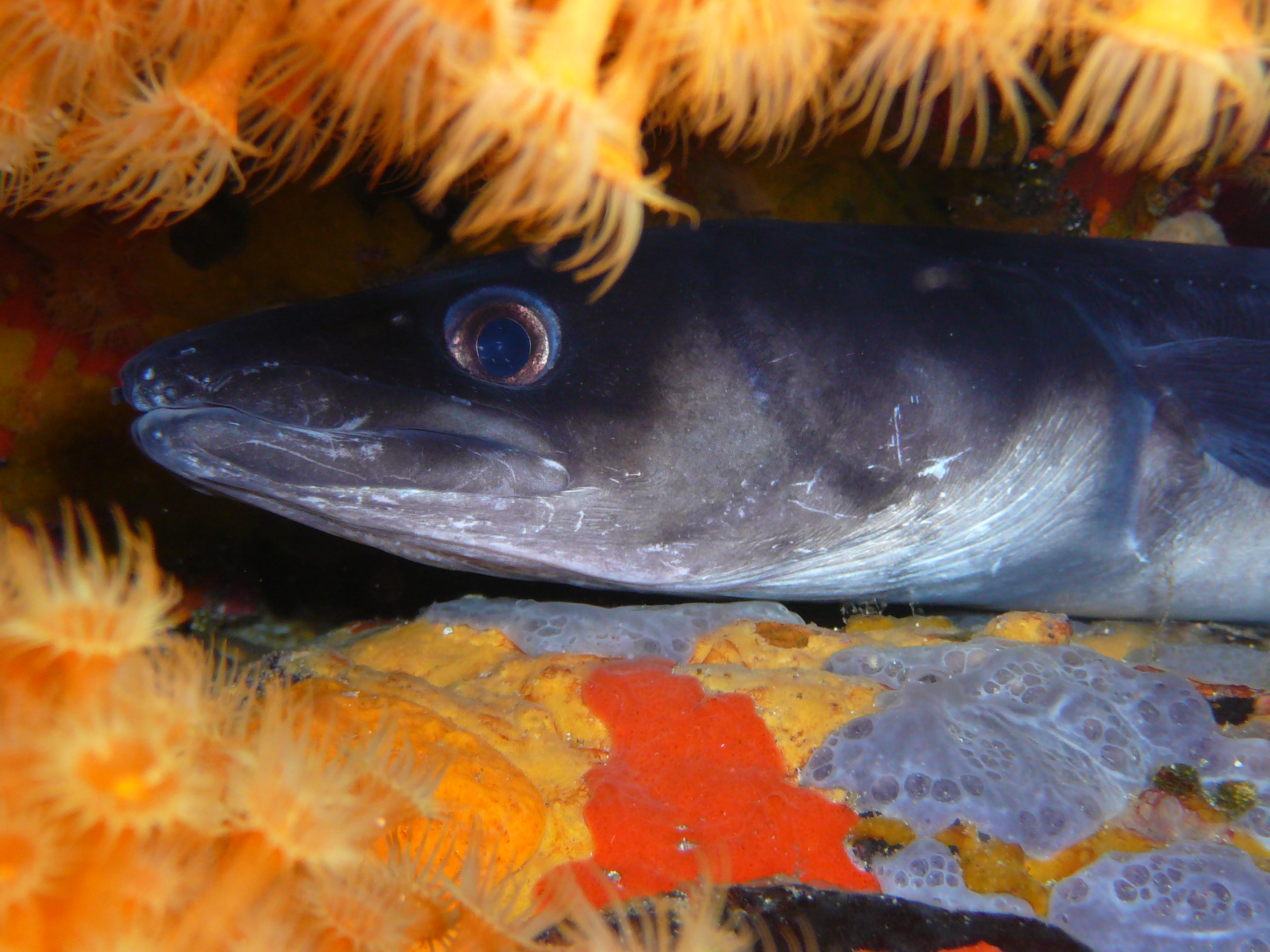 Conger conger - Meeraal, Aufgenommen unter Wasser in Port Cros